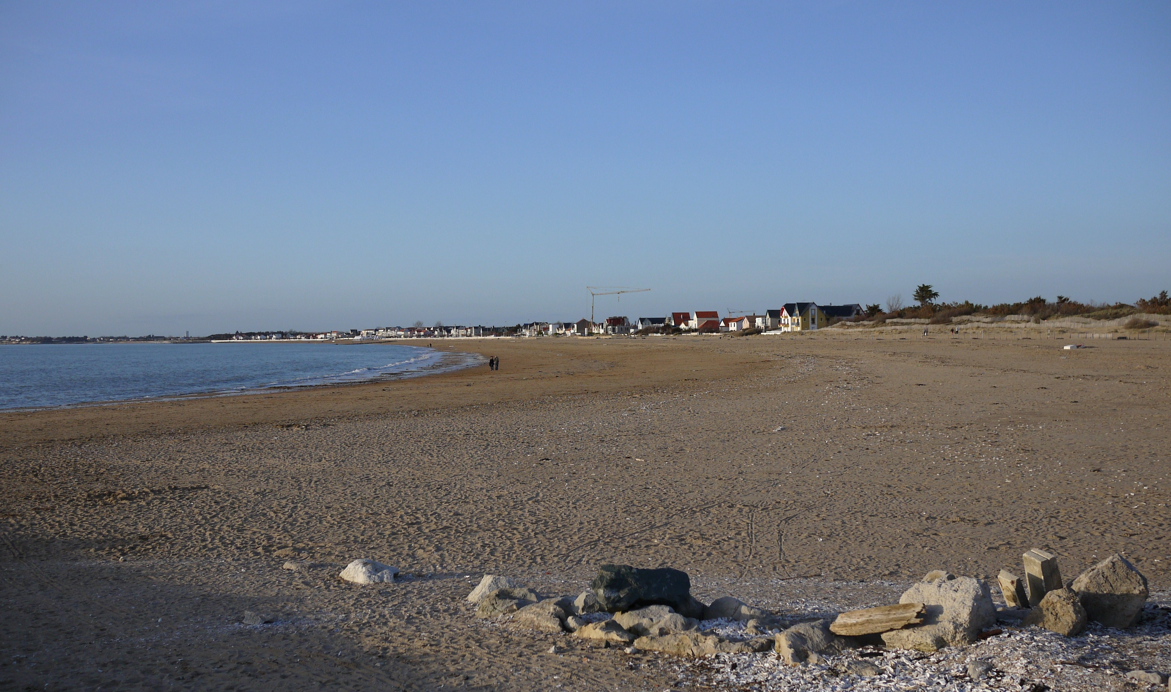 La plage de Châtelaillon un soir au début du mois d' avril. Cette plage mesure 2,5 km de long et 60 mètres de large. La plage de Châtelaillon avait peu à peu disparu sous les effets de vent et de la marée. De 1989 à 1991 elle a été ré-ensablée avec 330000 m3 de sable extraits à 25 kilomètres au large. Cette photographie a été prise depuis le port de plaisance. Châtelaillon-Plage, Charente Maritime, France.